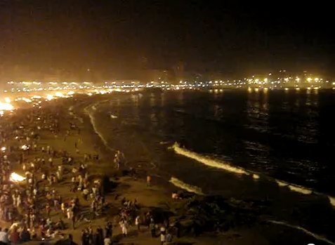 Playas de Riazor y Orzán en la noche de San Juan.